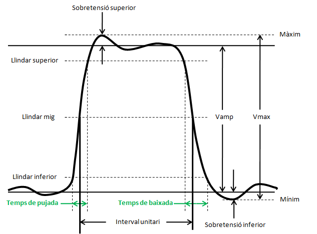 Paràmentres del pols